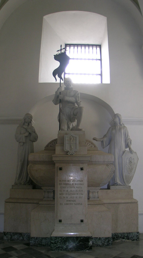 Rodrigo de Bastidas monument. Cathedral of Santa Marta, Colombia.